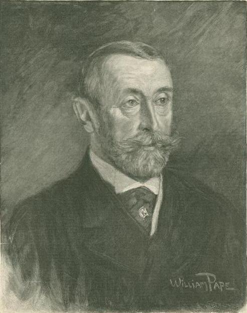 Hermann Fürst zu Hohenlohe-Langenburg, Statthalter von Elsaß-Lothringen. Gemälde, veröffentlicht auf dem Titel der Illustrirten Zeitung, Nr. 3219, 9 March 1905